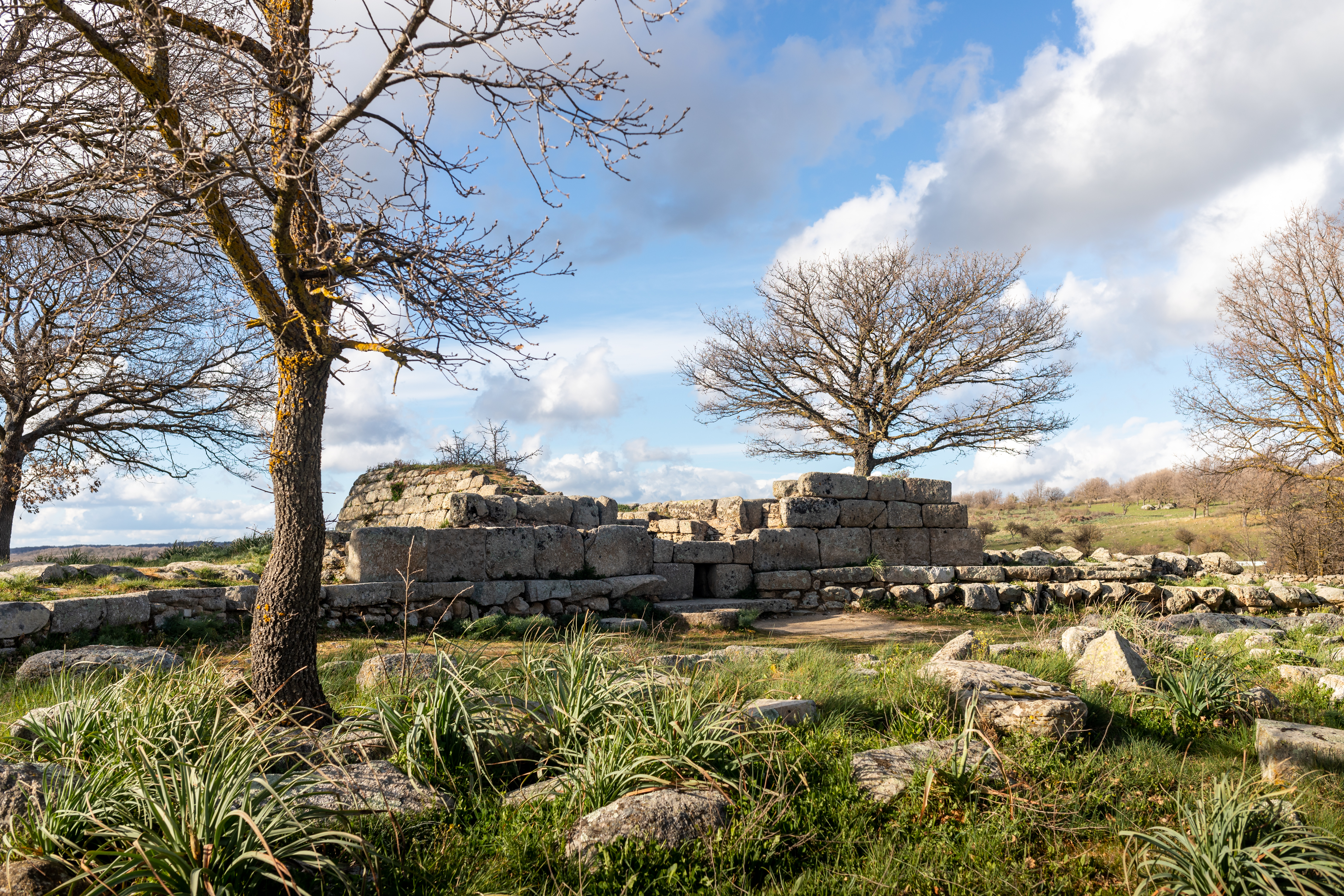 La sepoltura fa parte di una necropoli monumentale composta da quattro "tombe di giganti". Queste sepolture risalgono all'Età del Bronzo e sono attribuite alla civiltà nuragica. This is a photo of a monument which is part of cultural heritage of Italy.